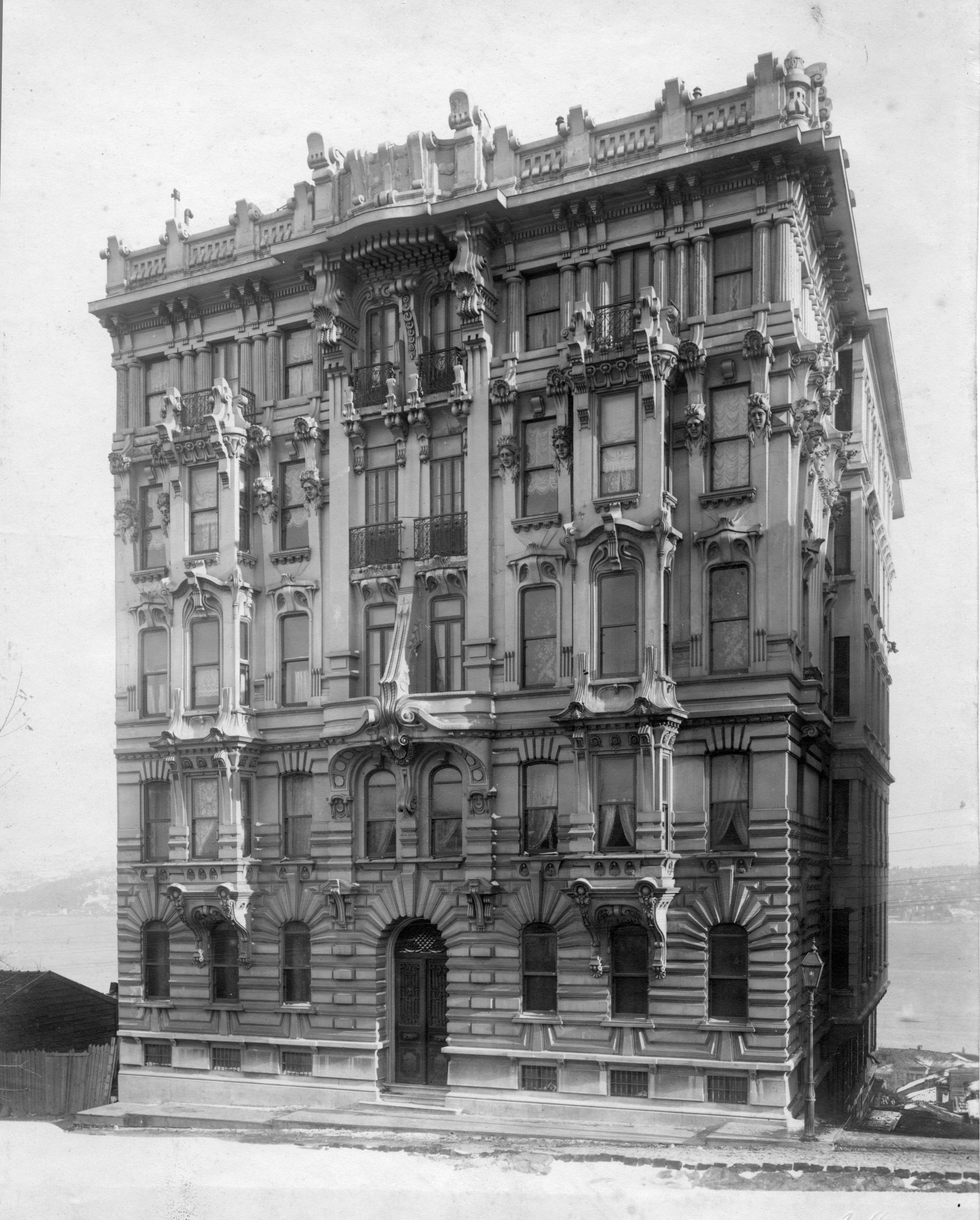 Léon Gurekian - Appartamenti Azarian - Costantinopoli